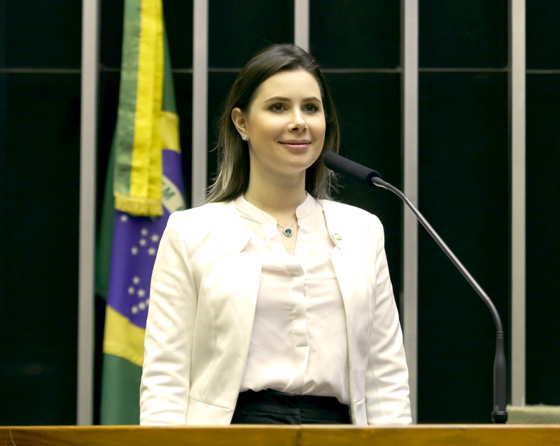 Caroline De Toni fala na tribuna da Câmara dos Deputados.